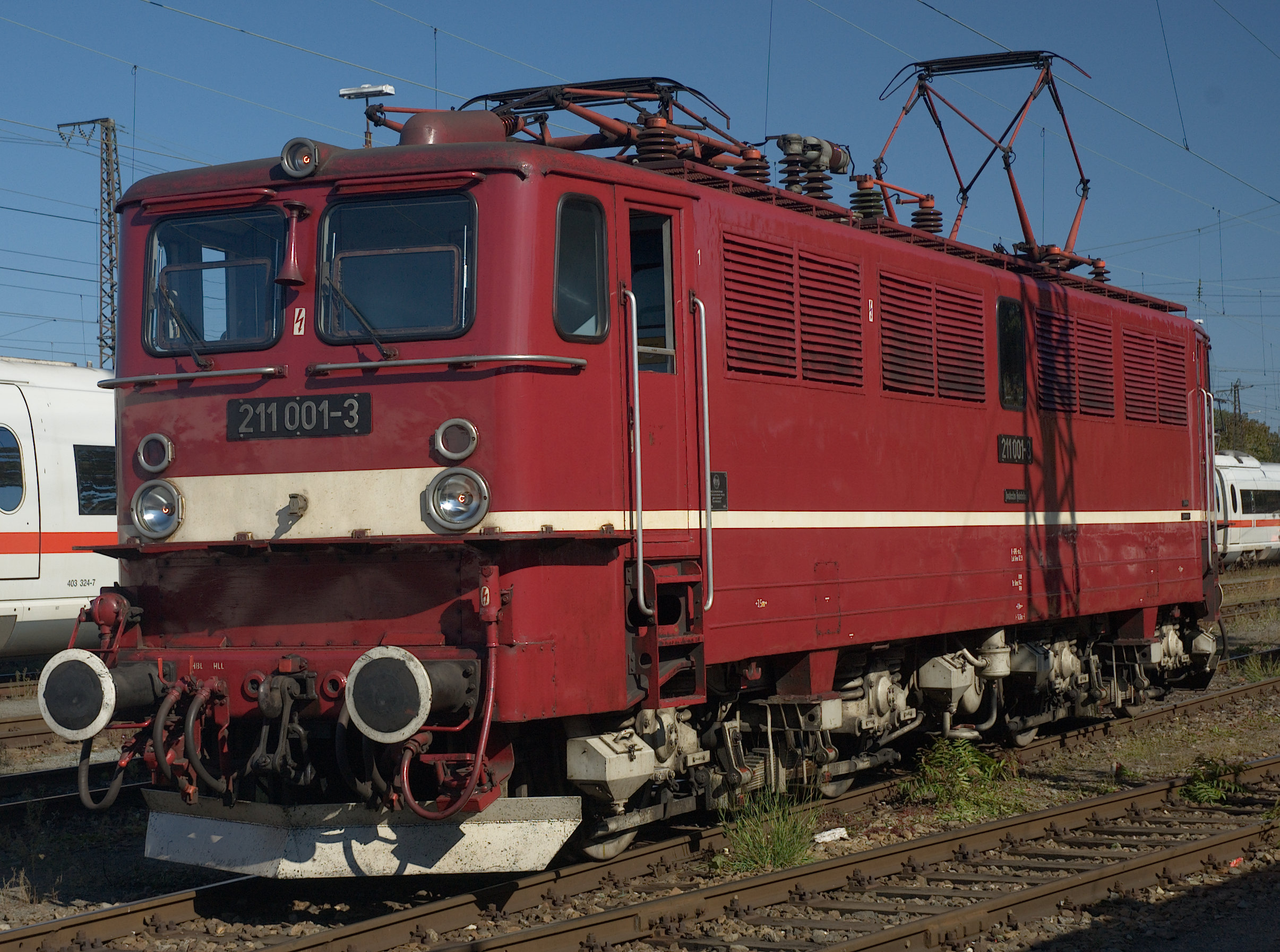 211 001-3 Erste Lok der DR Baureihe E11